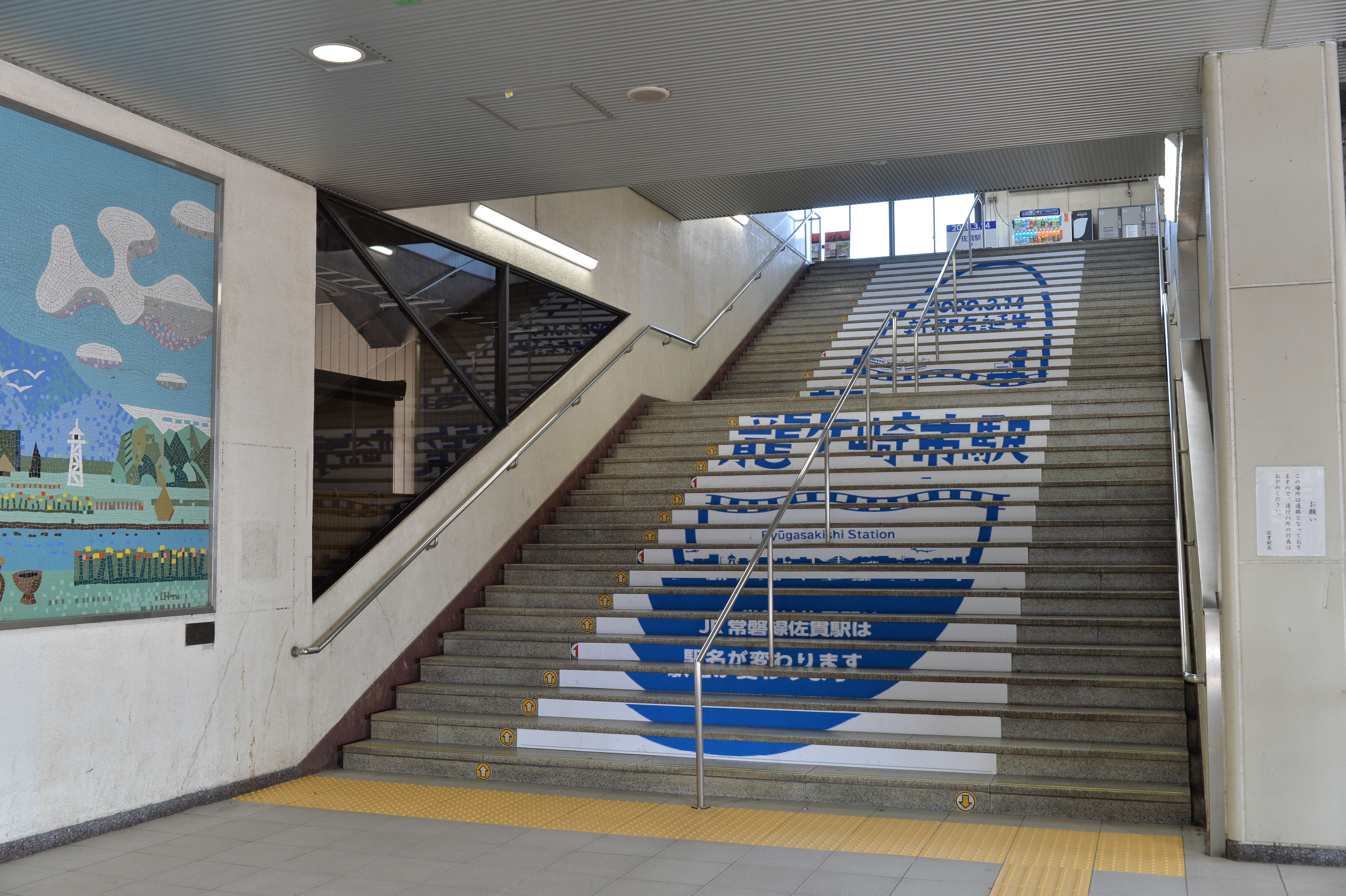 佐貫駅東口の昇降階段に表示された告知看板「2020.3.14 新駅名誕生 龍ケ崎市駅 JR常磐線佐貫駅は駅名が変わります」と書かれている。